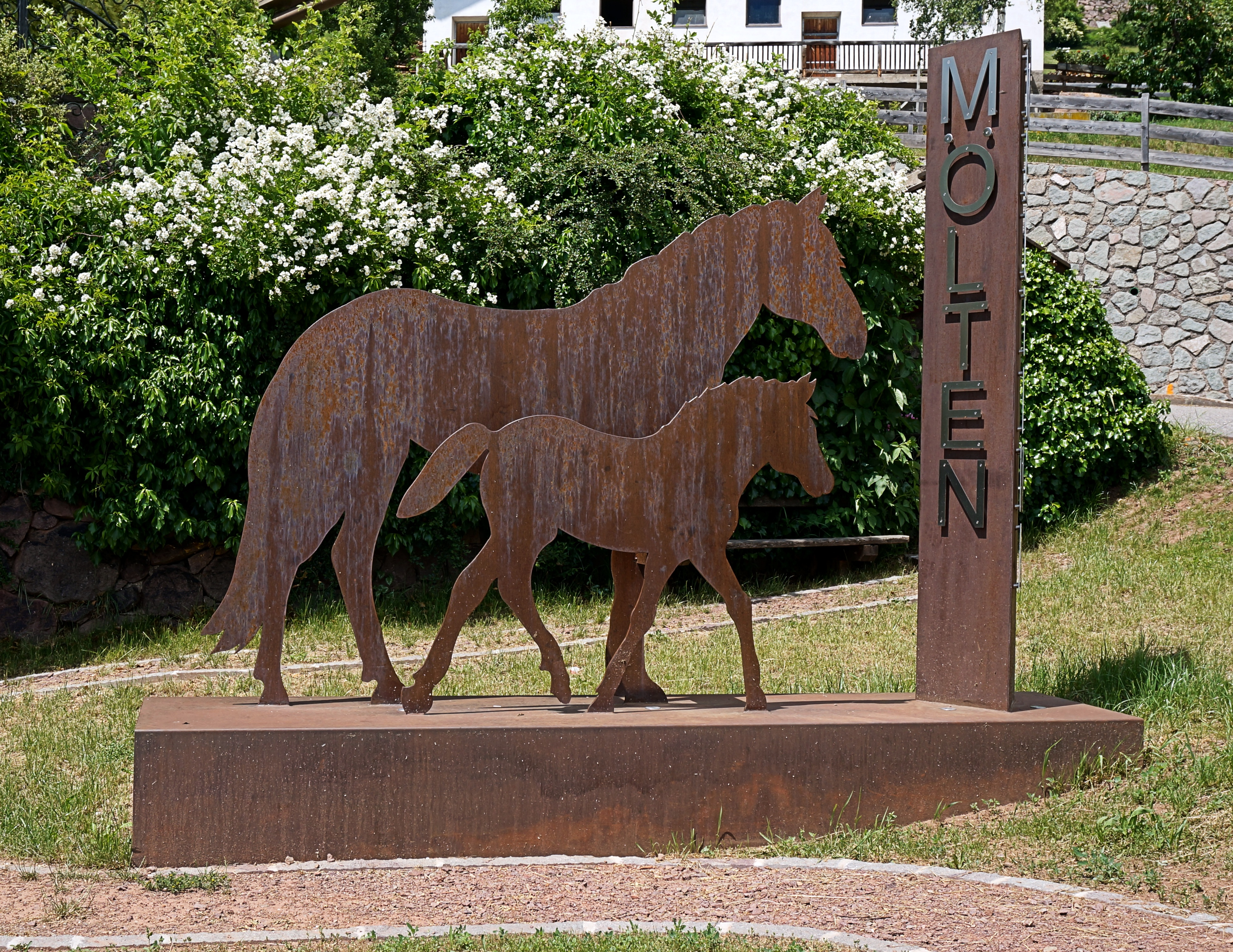 Italien, Südtirol, Mölten, Pferdestele, die das Wappentier der Gemeinde Mölten darstellt